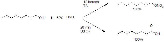 influence des ultrasons sur la réactivité d'une raction chimique